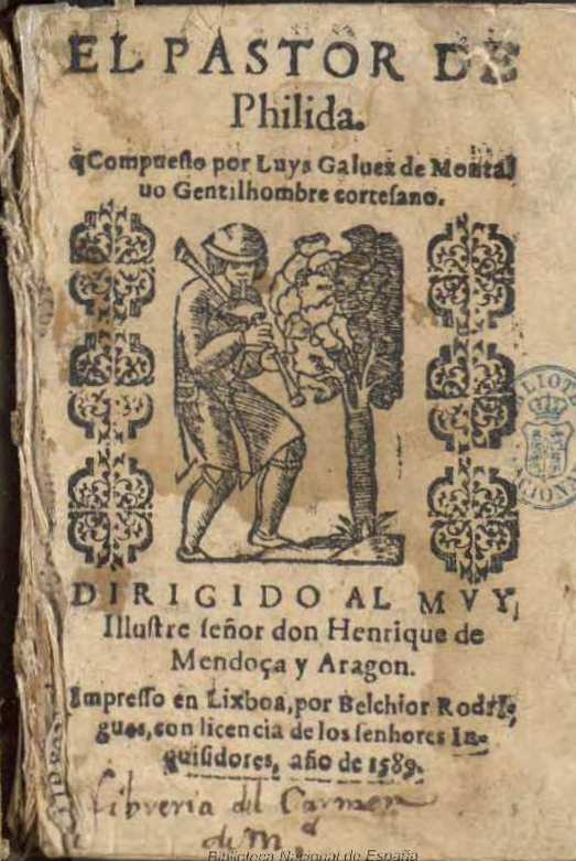 El pastor de Philida compuesto por Luys Galuez de Montaluo Gentilhombre cortesano...Impresso en Lixboa por Belchior Rodrigues , 1589